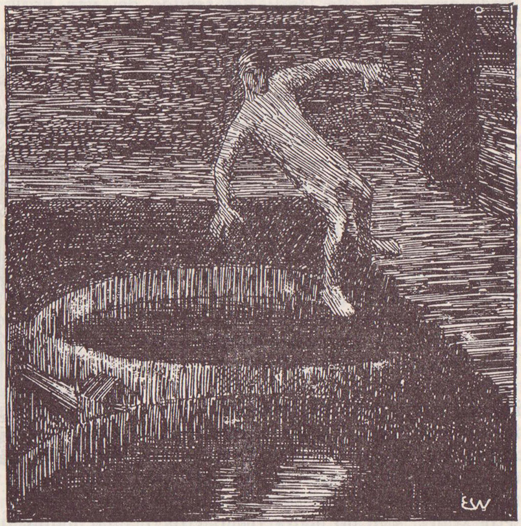 Fjolne detter i mjødkaret